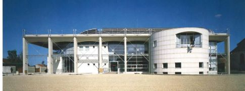 Arpetan: Mairie de Vineuil